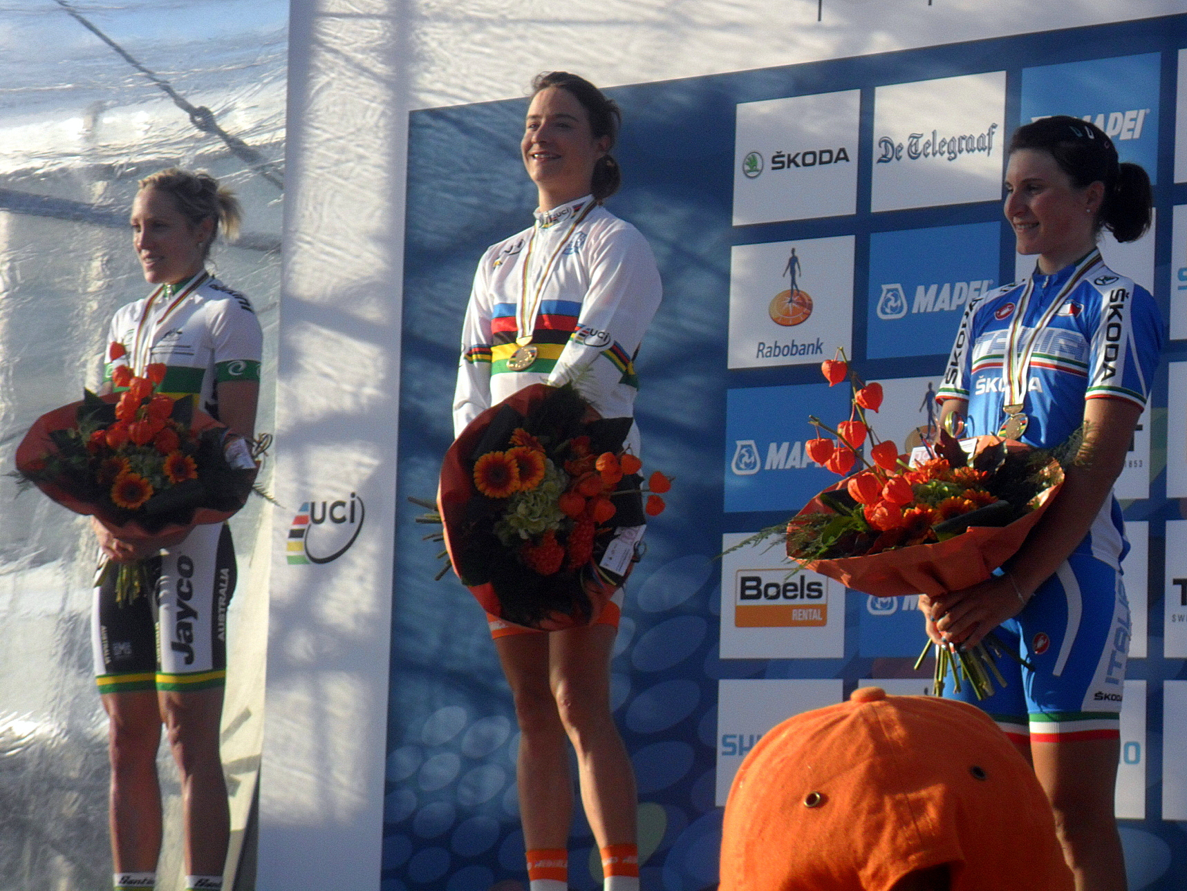 Podiumceremonie van het Wereldkampioenschap 2012 in Valkenburg, Nederland. 1. Marianne Vos, Nederland 2. Rachel Neylan, Australië 3. Elisa Longo Borghini, Italië